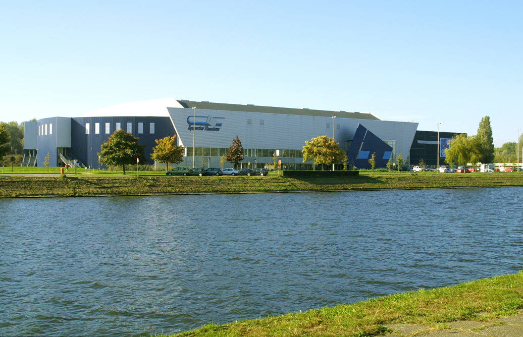 Buitenaanzicht van de Bloso Topsporthal Vlaanderen, Gent.